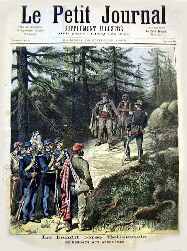 Réddition d'Antoine Bellacoscia aux gendarmes en 1883